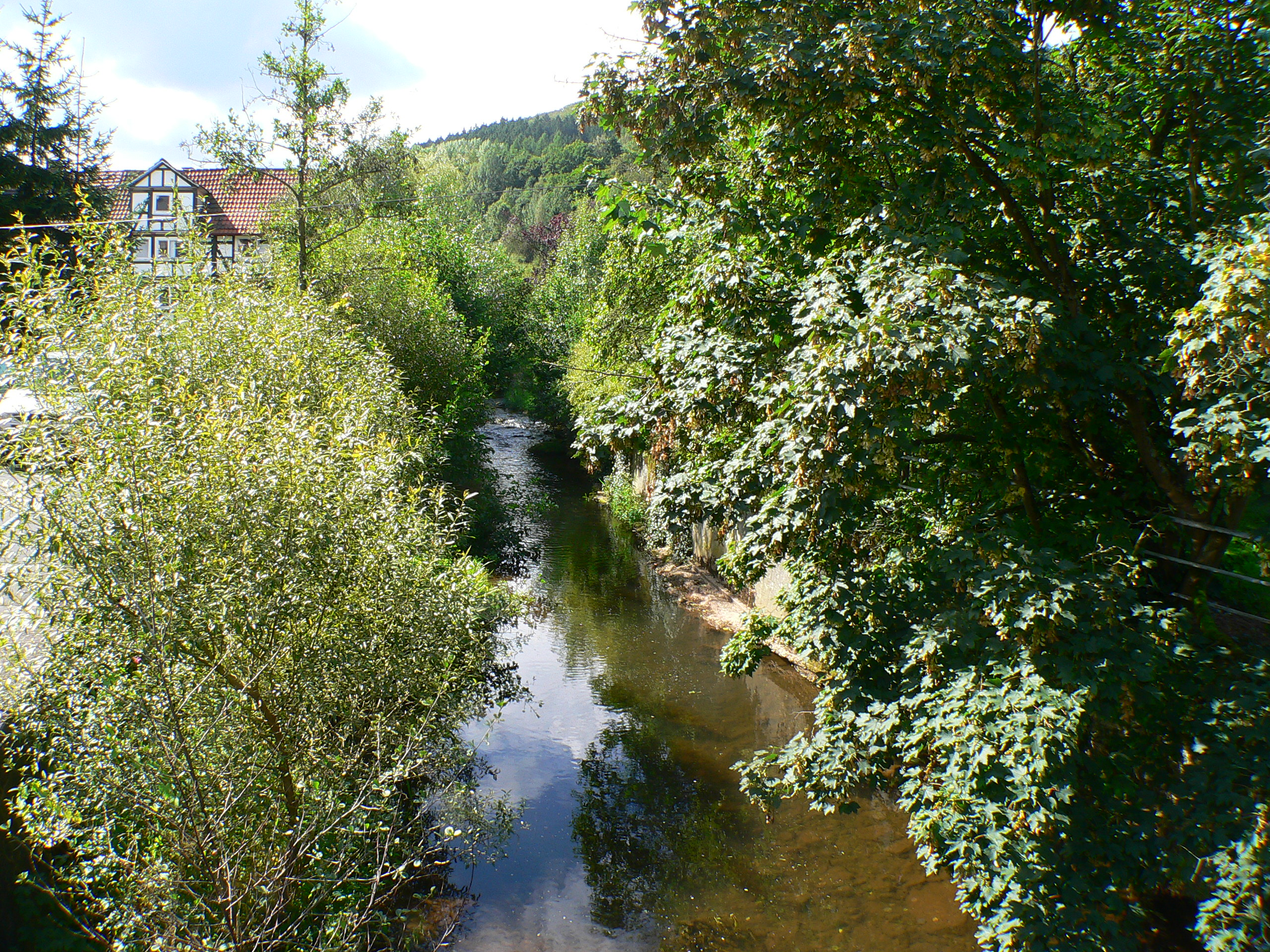 Der Fluss Losse in Helsa, Hessen, Deutschland.